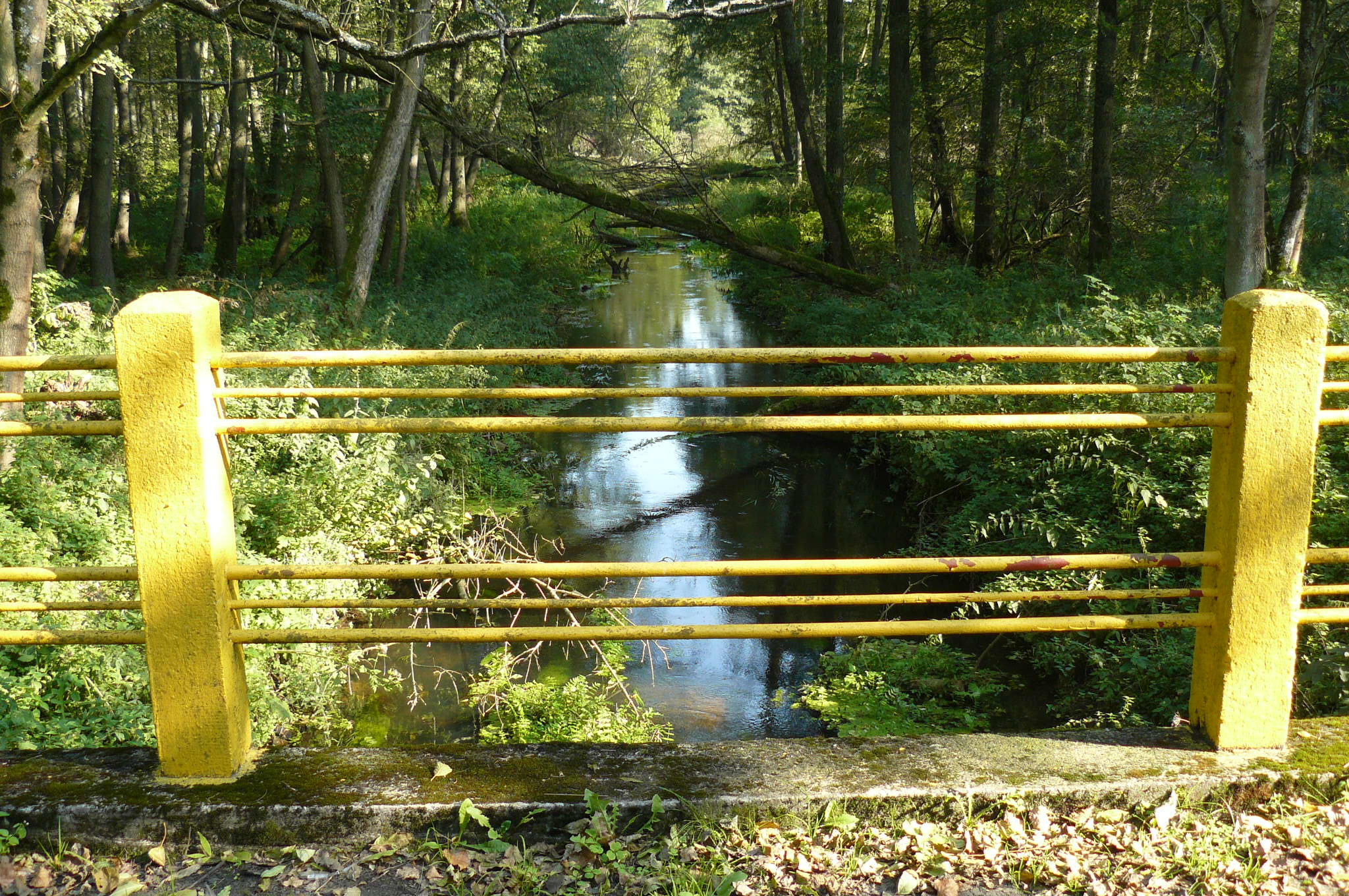 Czarna Woda w pobliżu Miedzichowa.